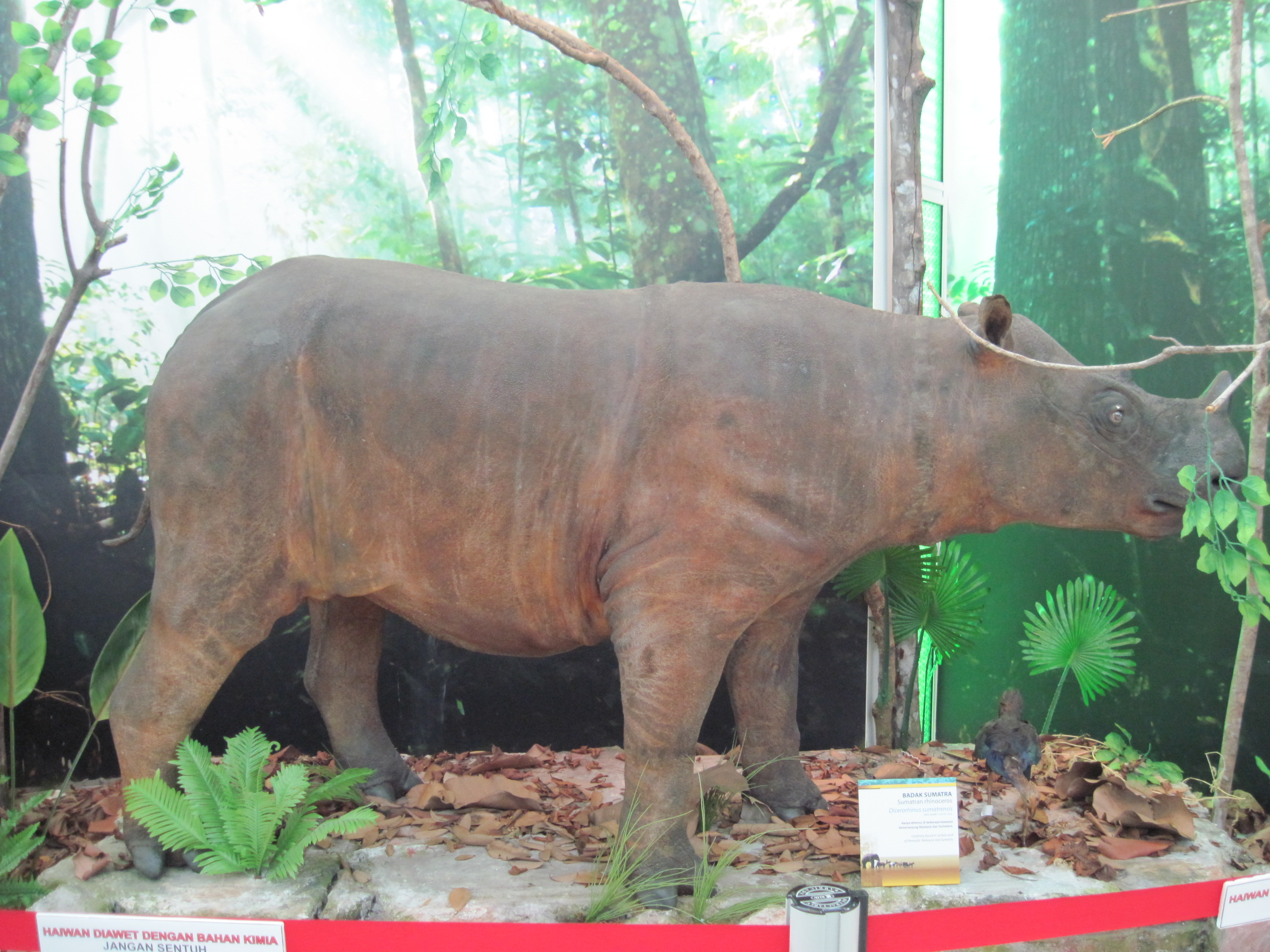 Patung badak sumbu.